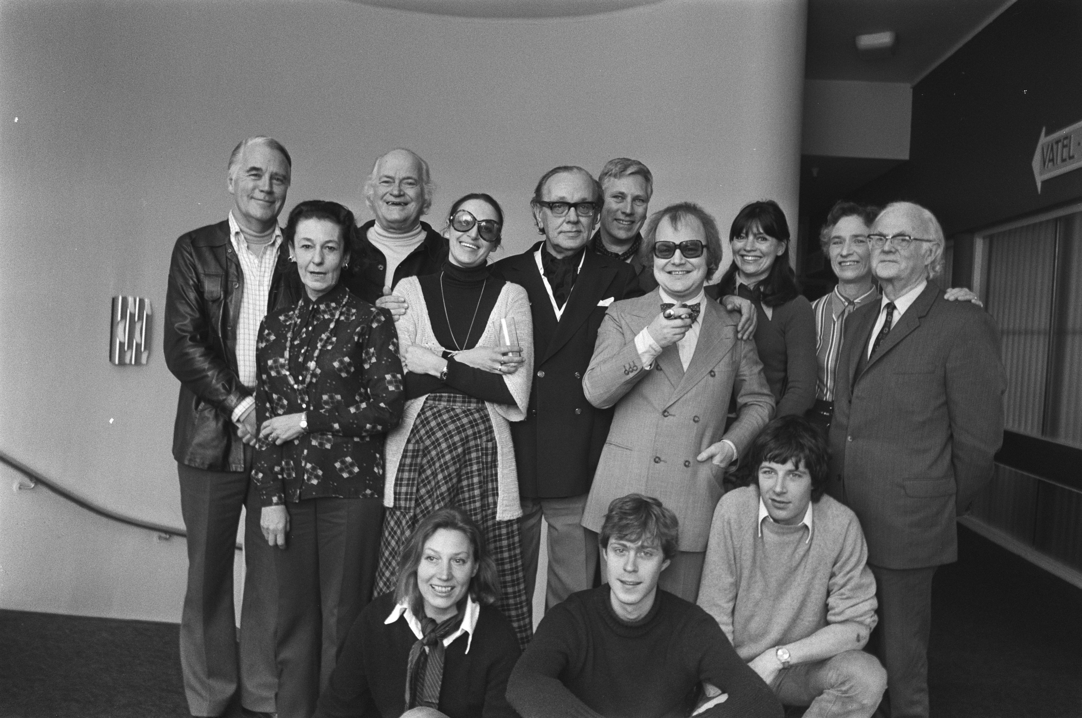 Persconferentie te Amsterdam i.v.m. Carel Briels' nieuwe produktie "Elckerlyc". V.l.n.r.: (staand) Bert Dijkstra, Liane Saalborn, lo van Hensbergen, Trins Snijders, Carel Briels, Tom van Beek, Jérôme Reehuis, Marijke Merckens, Reina Verheijen, [...]; (zittend) v.l.n.r.: Marlies van Alcmaer, Jan Henry de Vey Mestdagh en Helmer Hilwig. Persoonsnamen Alcmaer, Marlies van, Beek, Tom van, Briels, Carel, Dijkstra, Bert, Hensbergen, Lo van, Hilwig, Helmer, Merckens, Marijke, Reehuis, Jerôme, Saalborn, Liane, Snijders, Trins, Verheijen, Reina, Vey Mestdagh, Jan de locatie Amsterdam, Noord-Holland